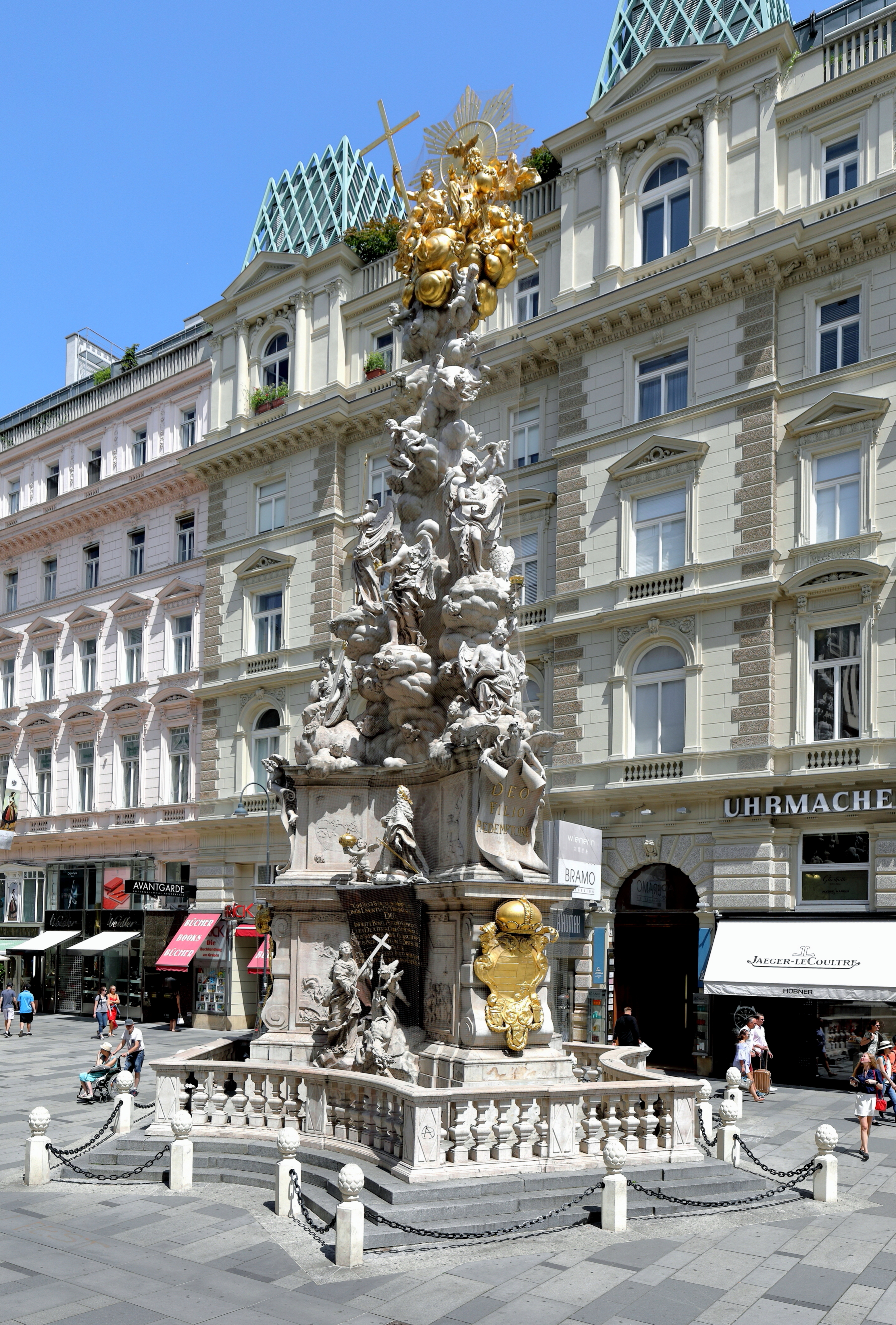 Südansicht der Dreifaltigkeits- bzw. Pestsäule am Graben im 1. Wiener Gemeindebezirk Innere Stadt.Die 21 Meter hohe barocke Säule wurde nach eine Pestepidemie mit wahrscheinlich etwa 100.000 Toten von Kaiser Leopold I. gestiftet und am 29. Oktober 1693, dem Dreifaltigkeitstag, geweiht. Das komplizierte ikonographische Programm entwarf der Jesuitenpater Franciscus Menegatti, der spätere Beichtvater von Kaiser Leopold I. An dem Projekt wirkten zahlreiche Architekten und Bildhauer mit, unter anderem: Joseph Frühwirth, Matthias Rauchmüller, Johann Bernhard Fischer von Erlach, Paul Strudel, Lodovico Ottavio Burnacini, Johann Ignaz Bendl, Tobias Kracker der Ältere.